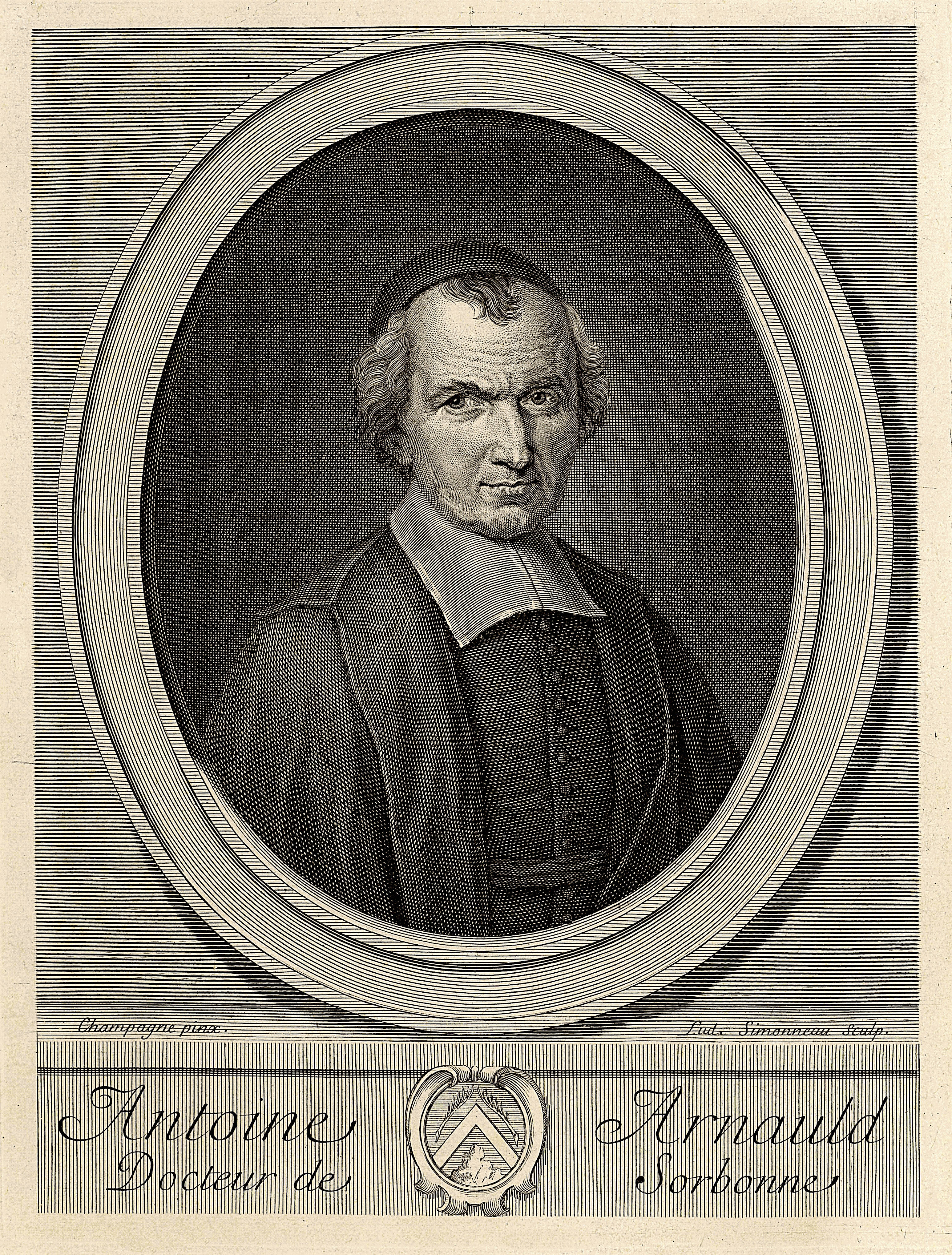 Antoine Arnauld (1612-1694), docteur de Sorbonne